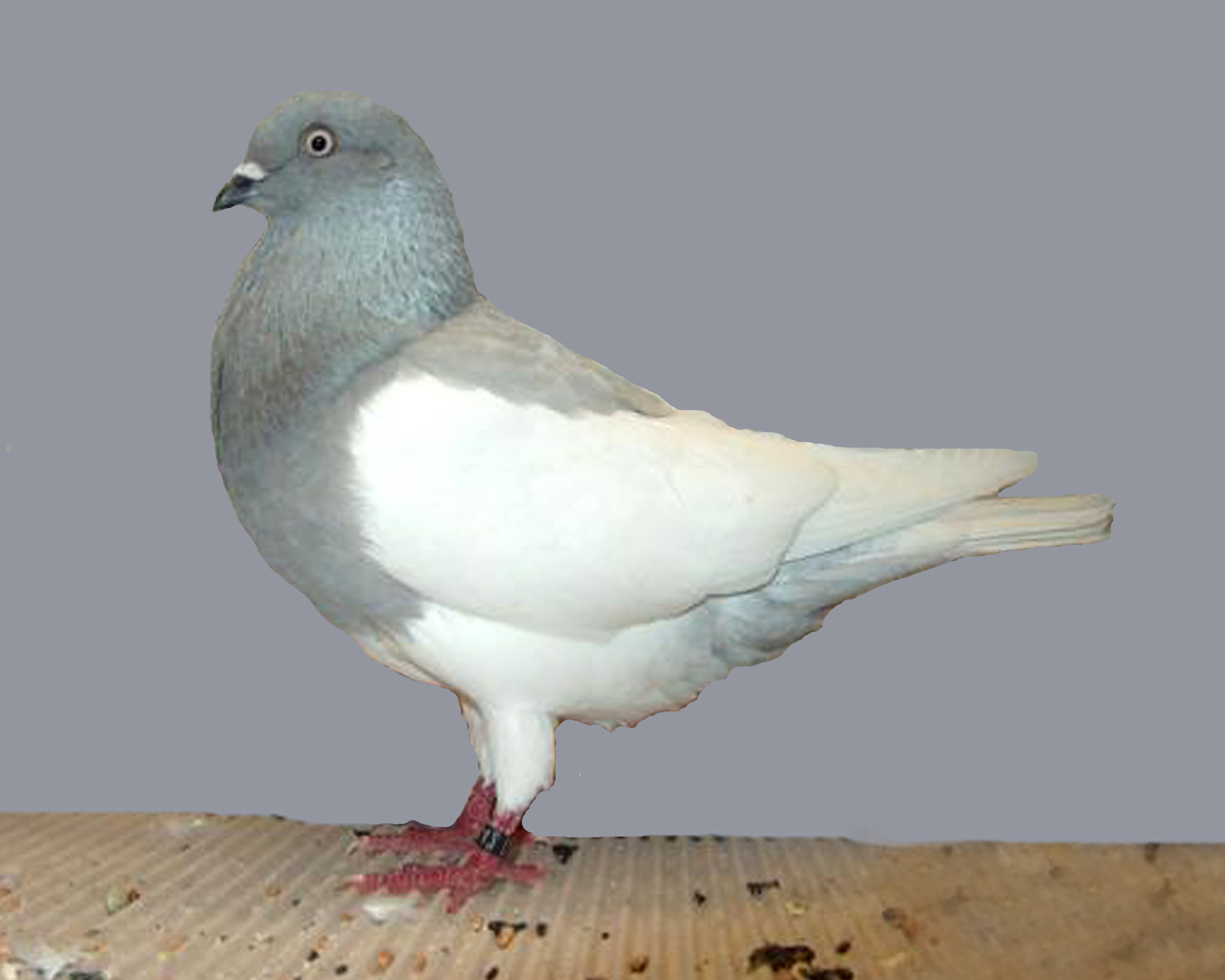 Old German Magpie Tumbler (Silver)